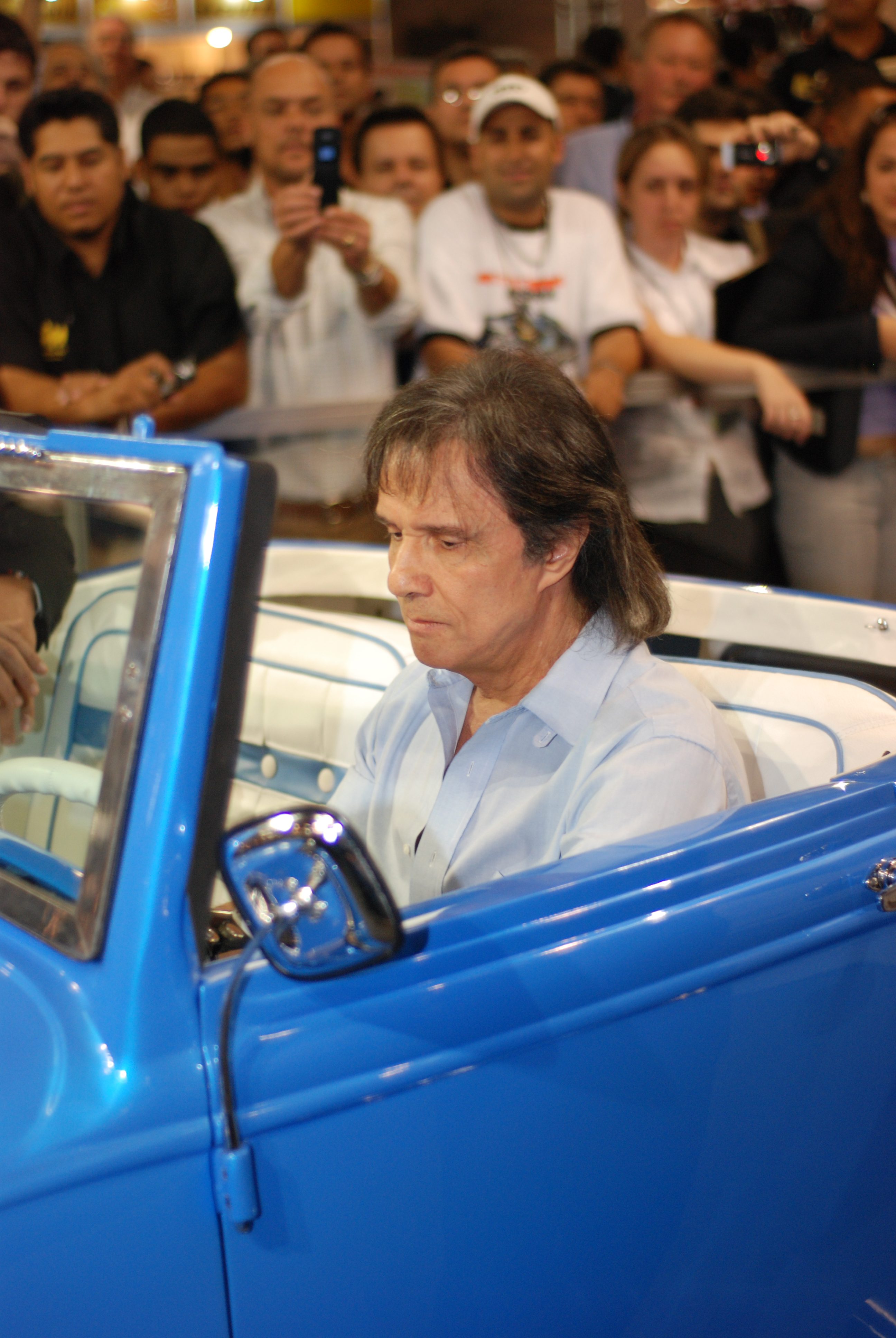 Roberto Carlos & Calhambeque